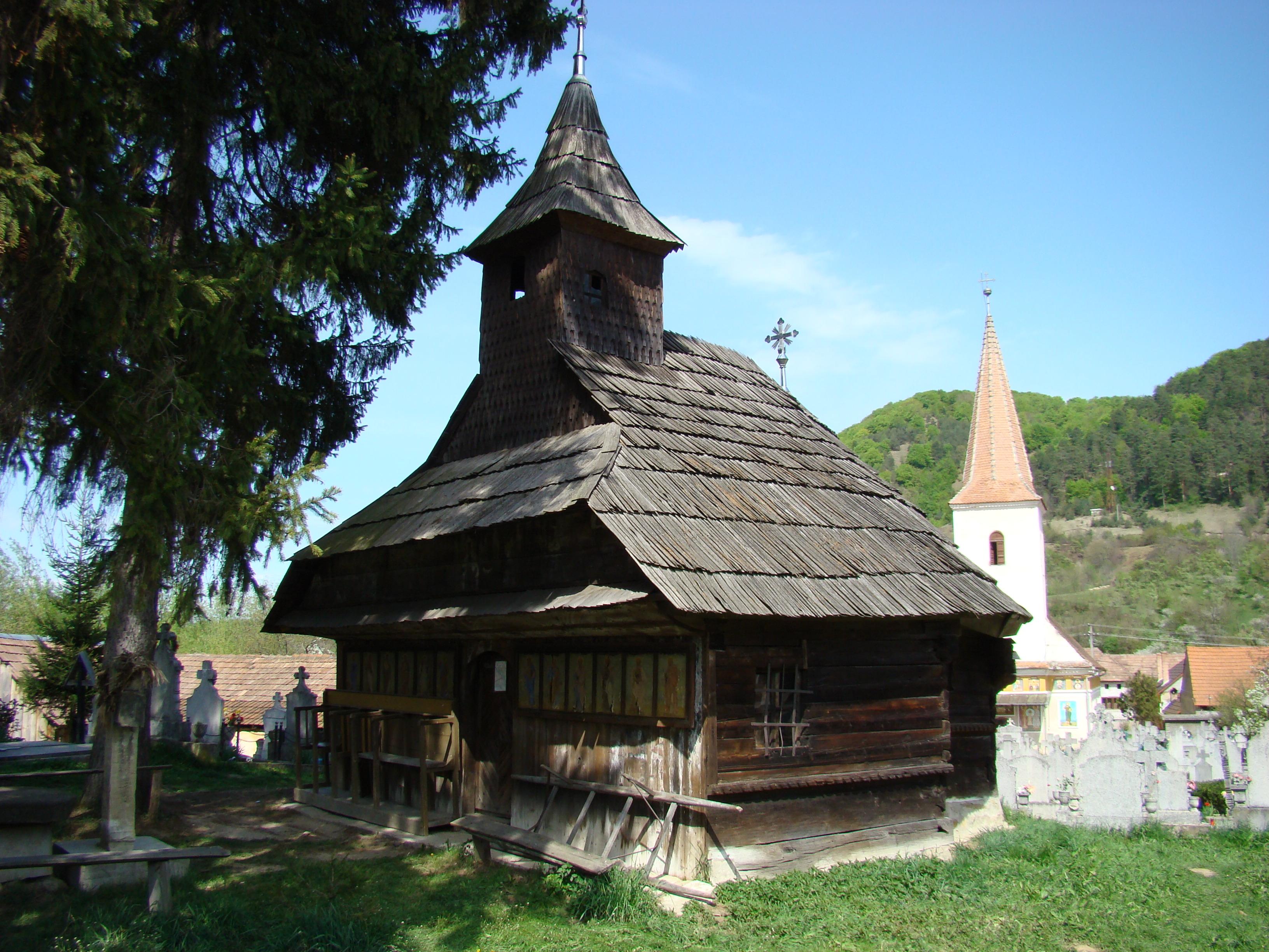 Biserica de lemn din Pianu de Sus, judeţul Alba.